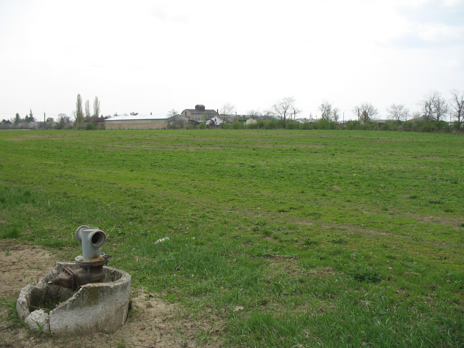 Galánta